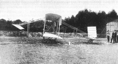 Первый российский самолёт